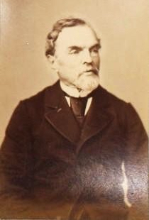 Emile de Kermenguy (1810-1893), député du Finistère de 1871 à 1893 (